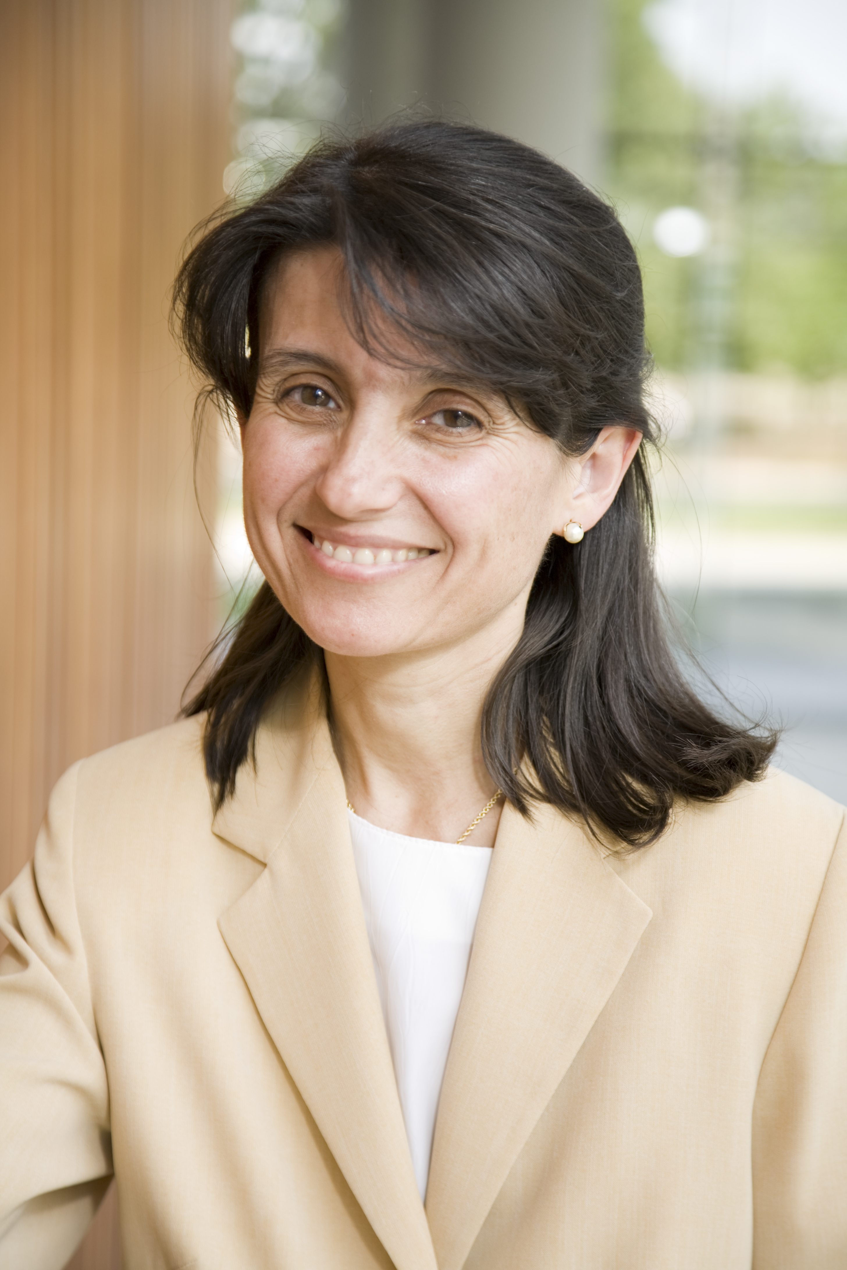 Portrait of the spanish scientist and molecular biologist Ana María Cuervo